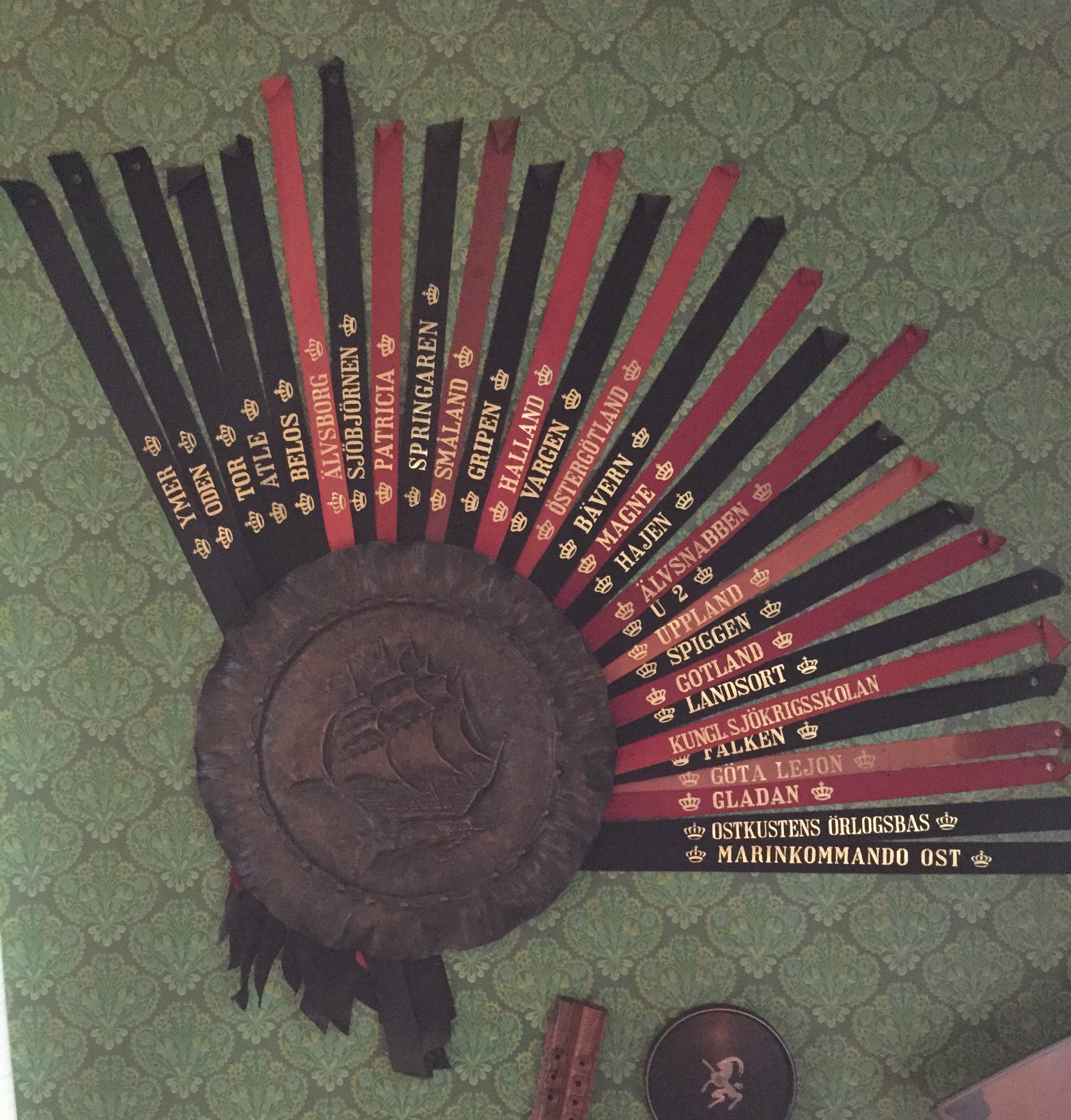 Jan Sundlöfs Mössband